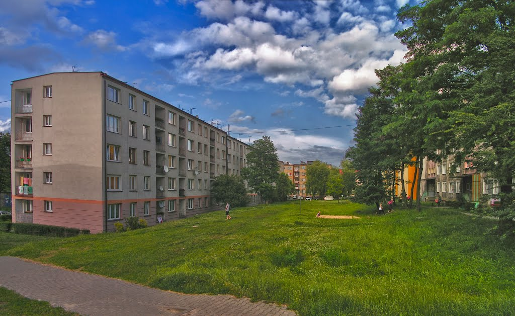 Blok przy ulicy 1000-lecia oraz Legnickiej.